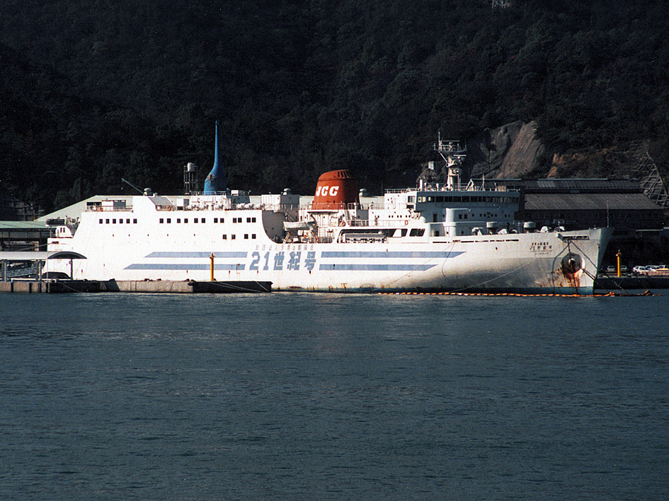 21世紀号 （元JR北海道 青函連絡船 檜山丸）